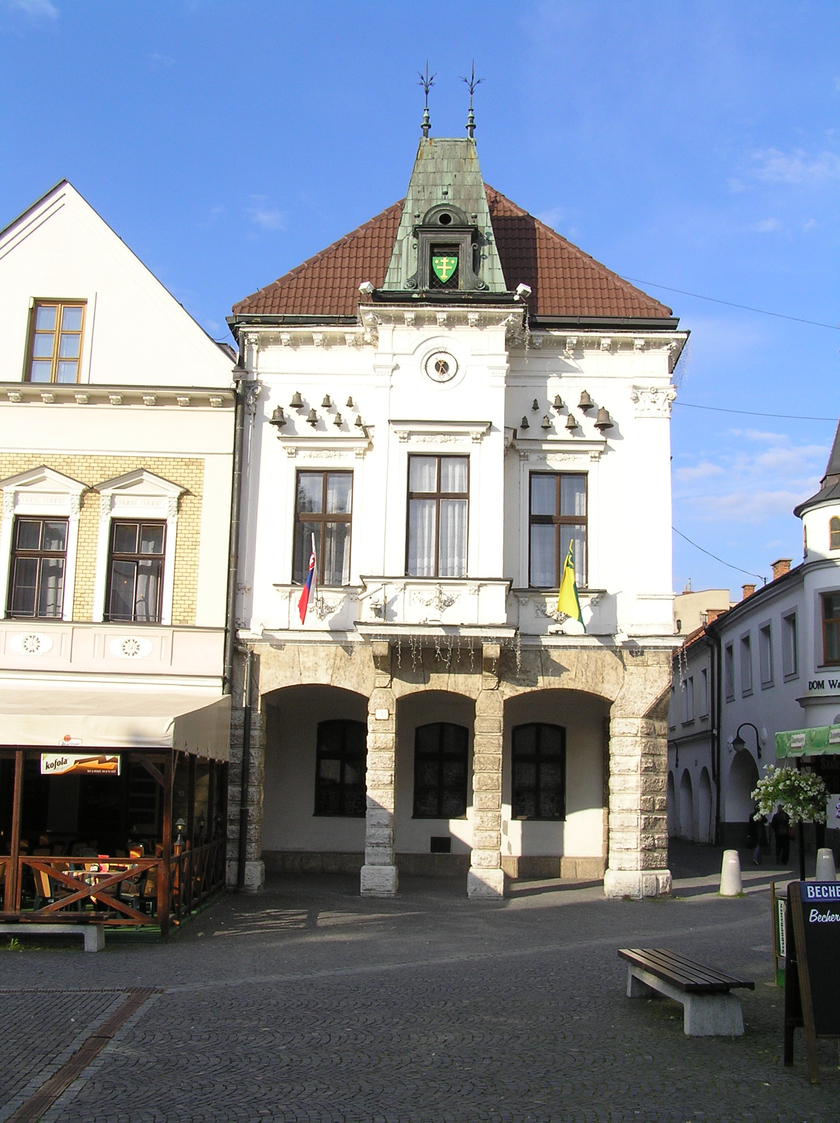 Mestská radnica spredu Mariánske námestie, Žilina This medium shows the protected monument with the number 511-10036/0 in the Slovak Republic.